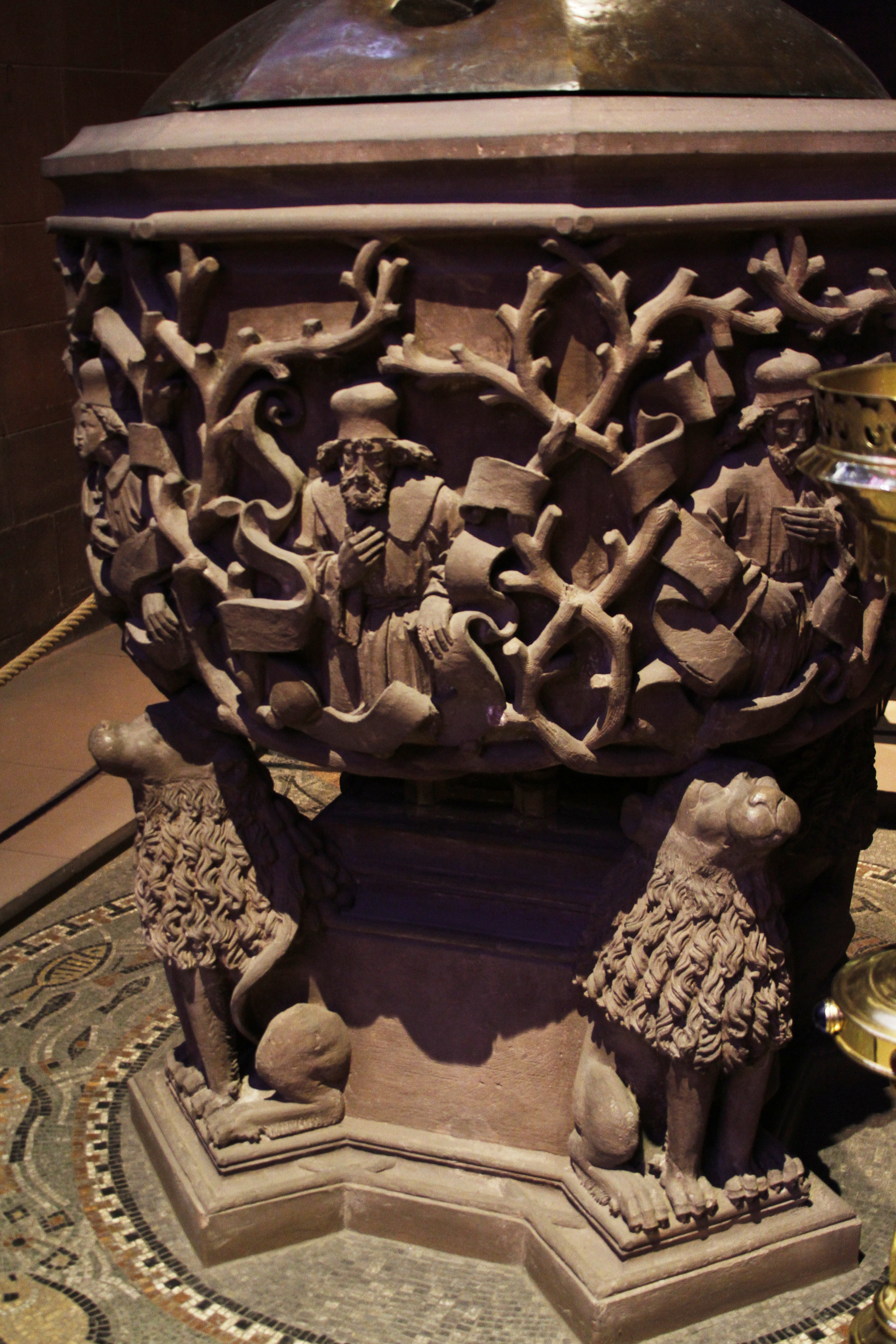 Worms Cathedral - Worms - Germany